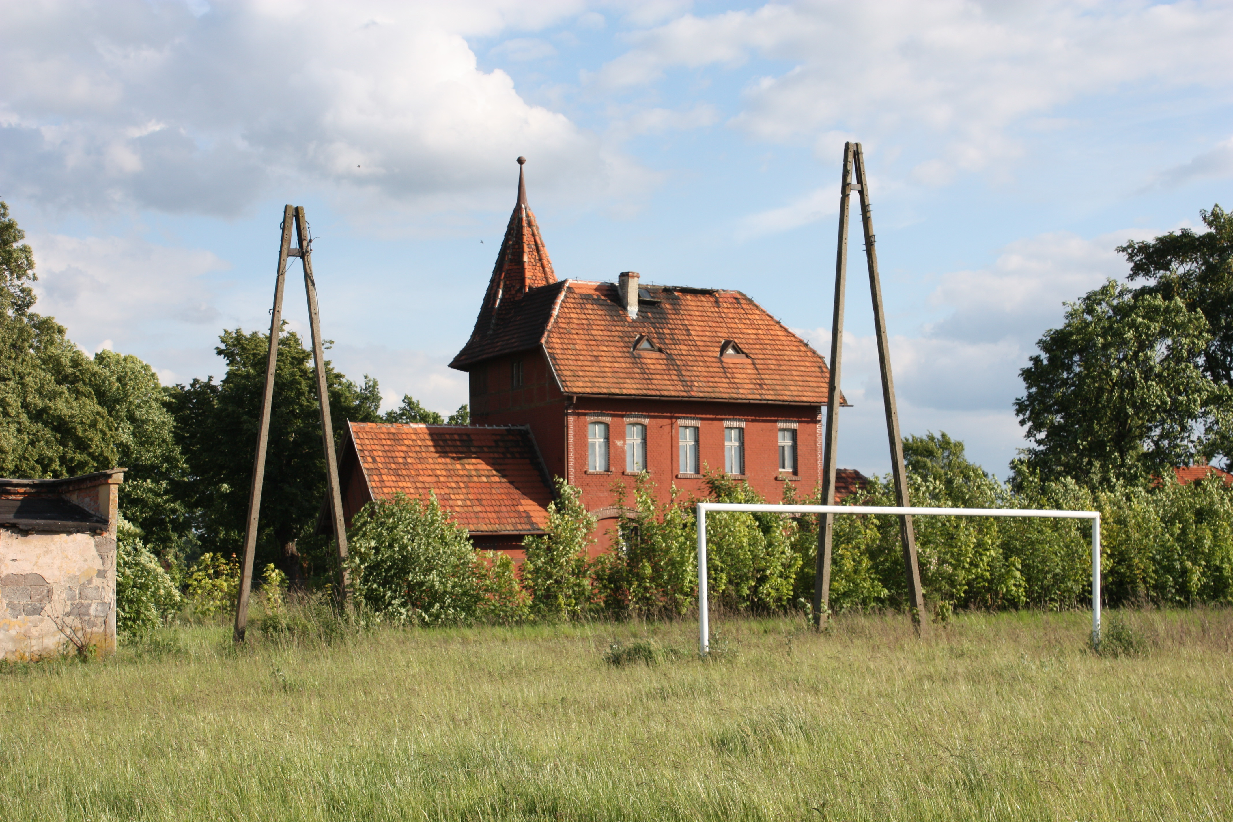 Przystanek kolejowy w Mierczycach